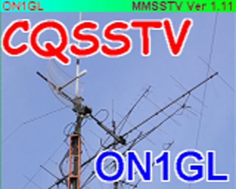 Publiek domein, zelf gemaakt, een voorbeeld hoe CQSSTV te roepen met een hamradio. Voorbeeld met afbeelding.